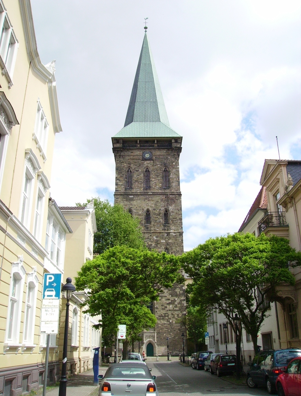 Die Katharinenkirche (St. Katharinen) in Osnabrück